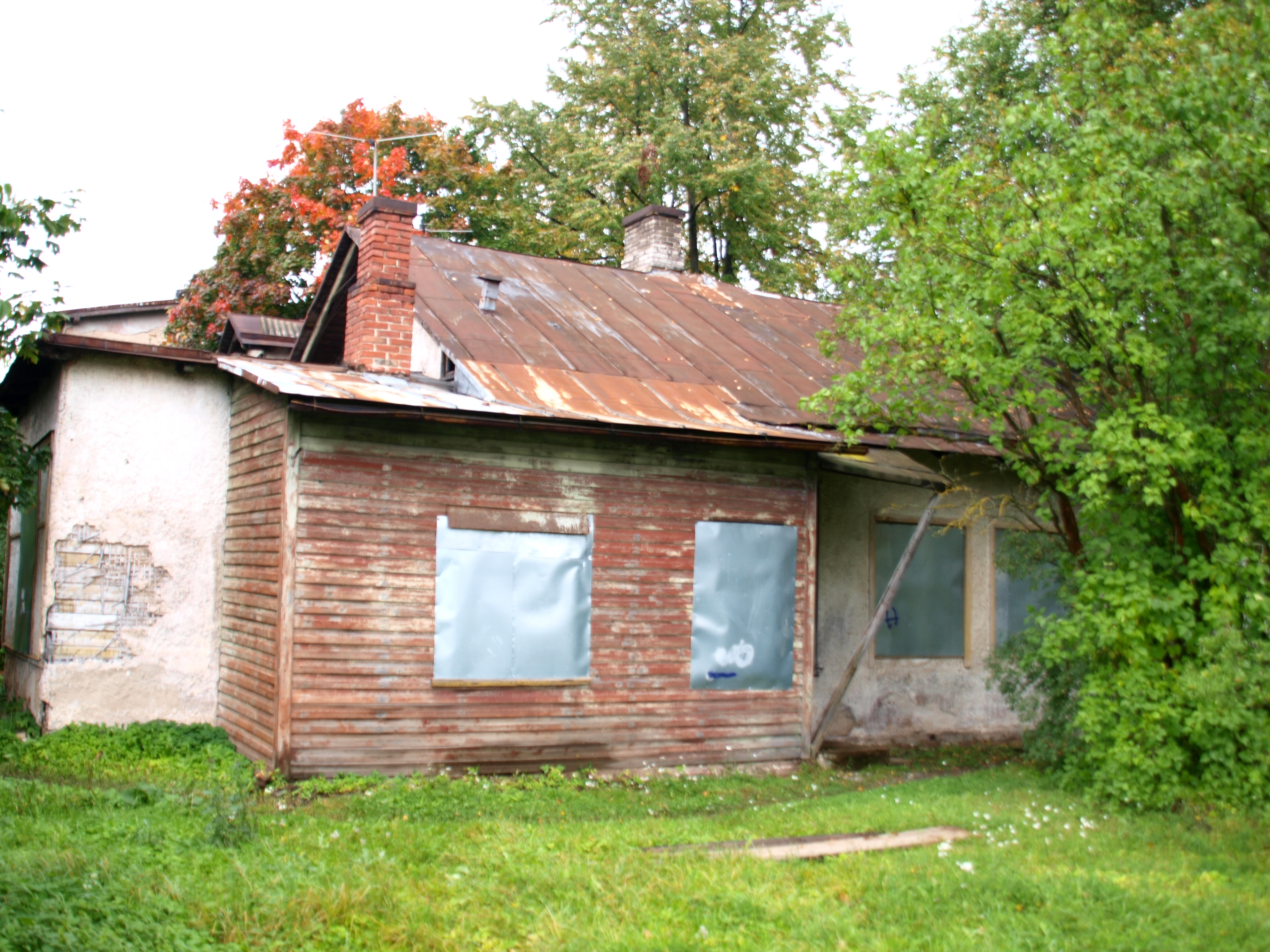 Maja. kus elas J. Tõnisson